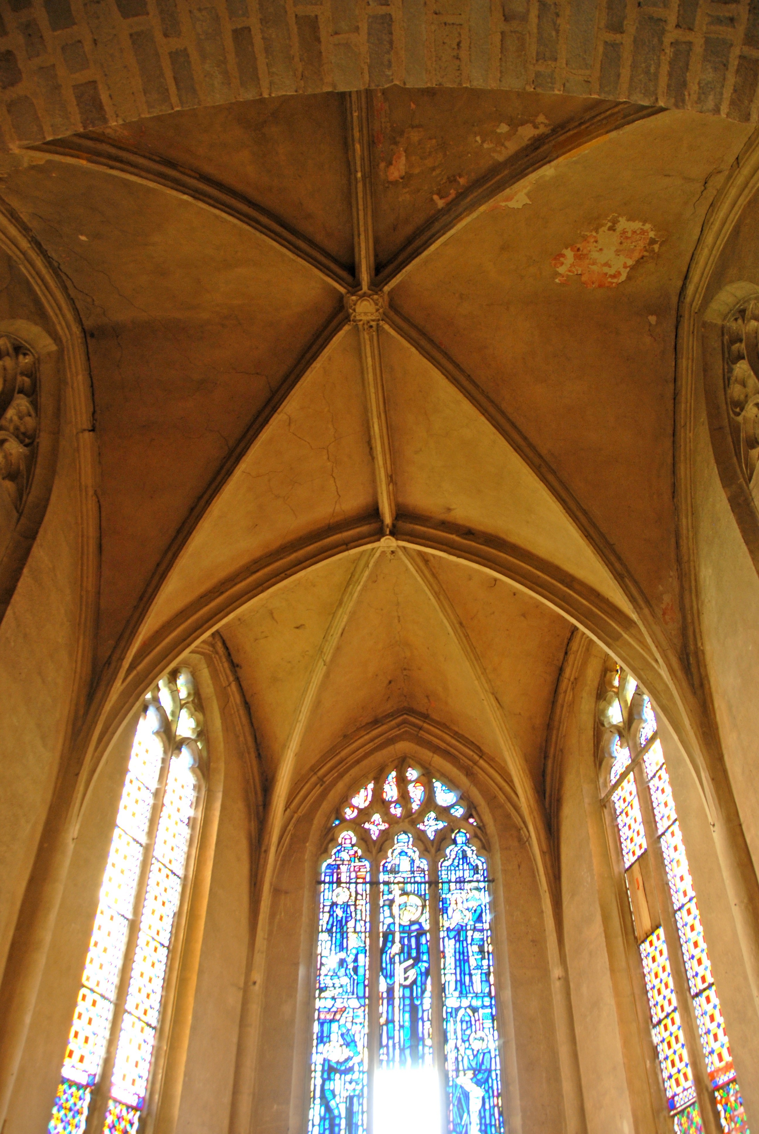 Prioratskirche, Chor